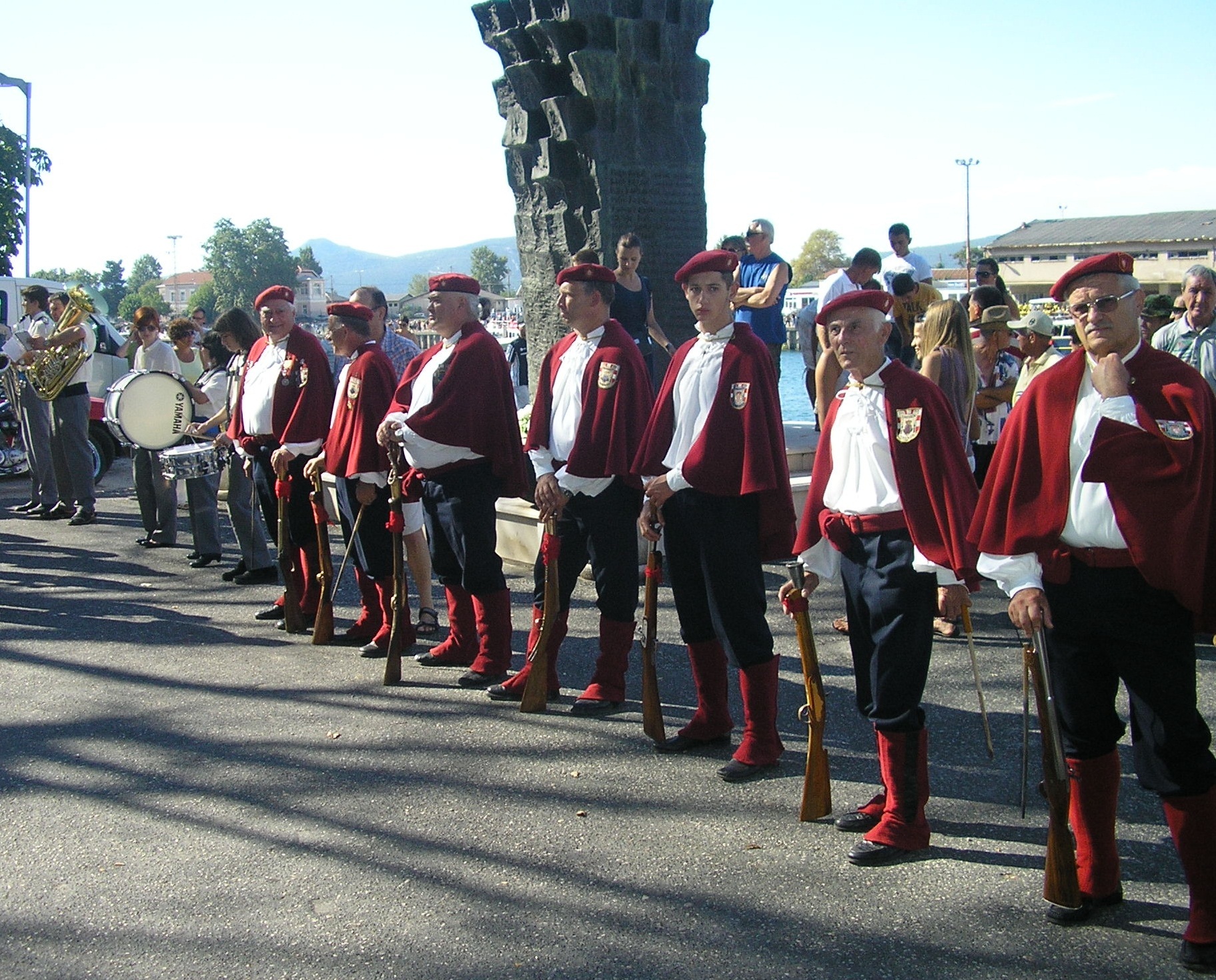 Trombunjeri na rivi u Metkoviću (Maraton lađa 2011.)